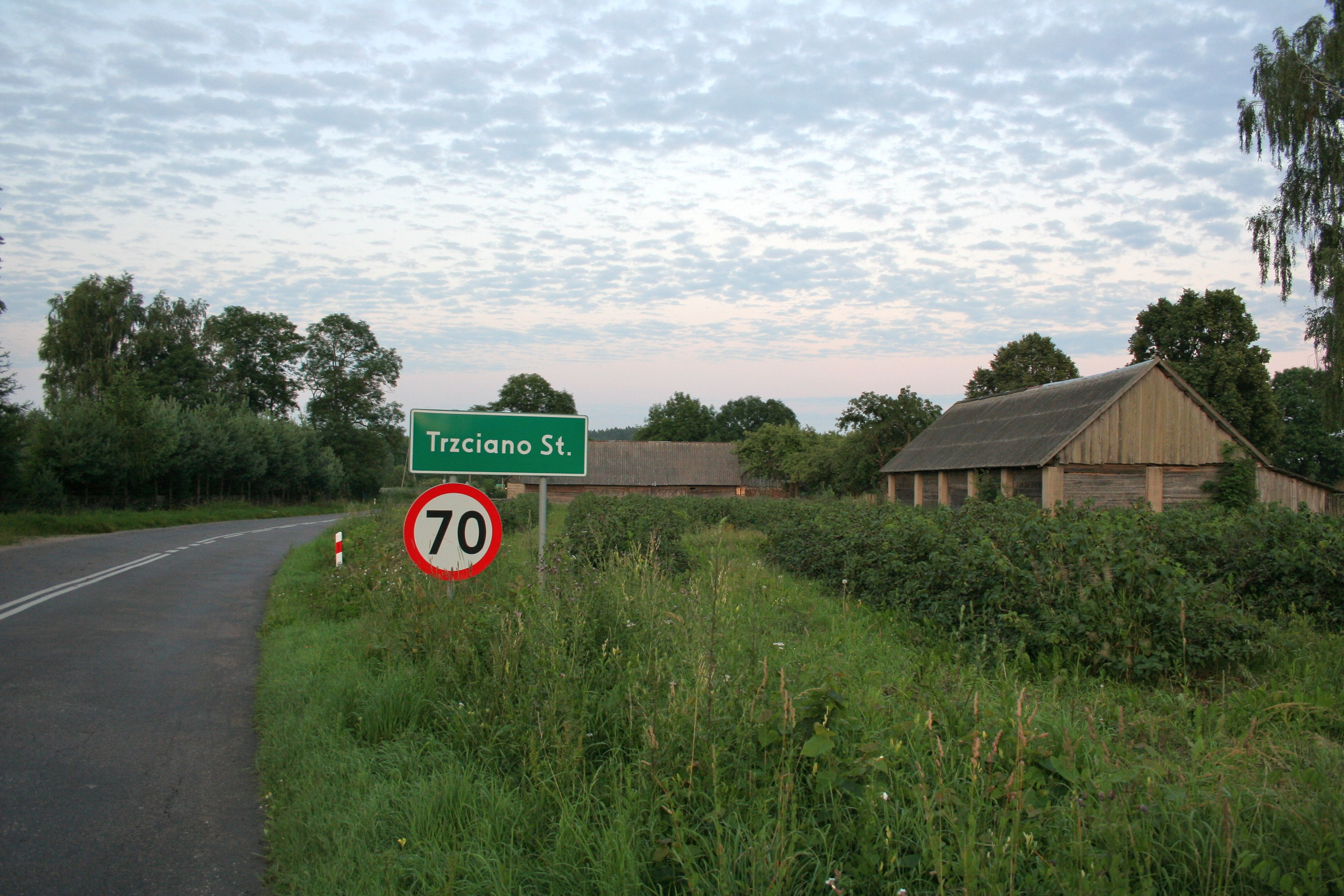 Droga wjazdowa do wsi Stare Trzciano.